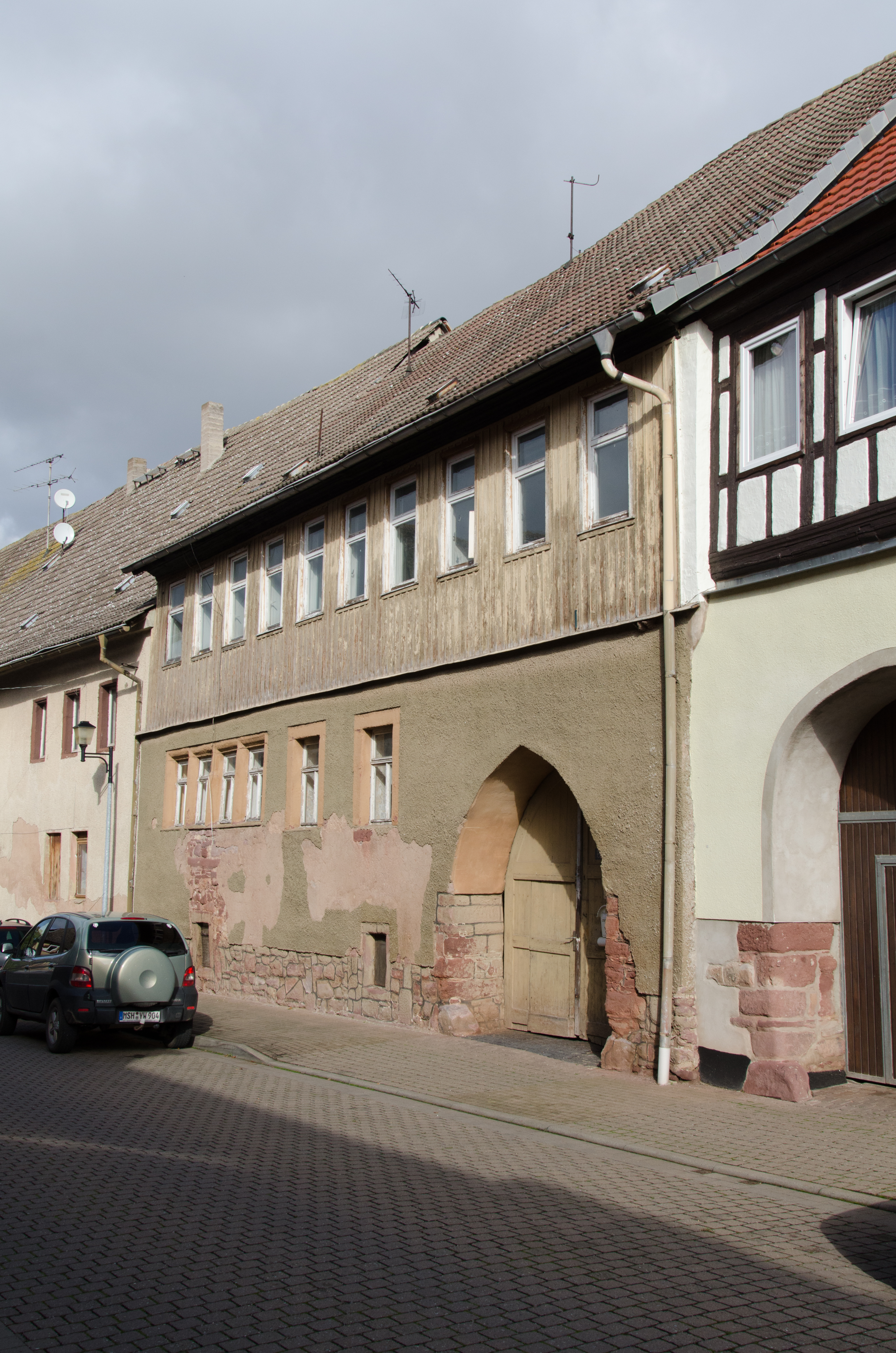 Kelbra, Bornstraße 6